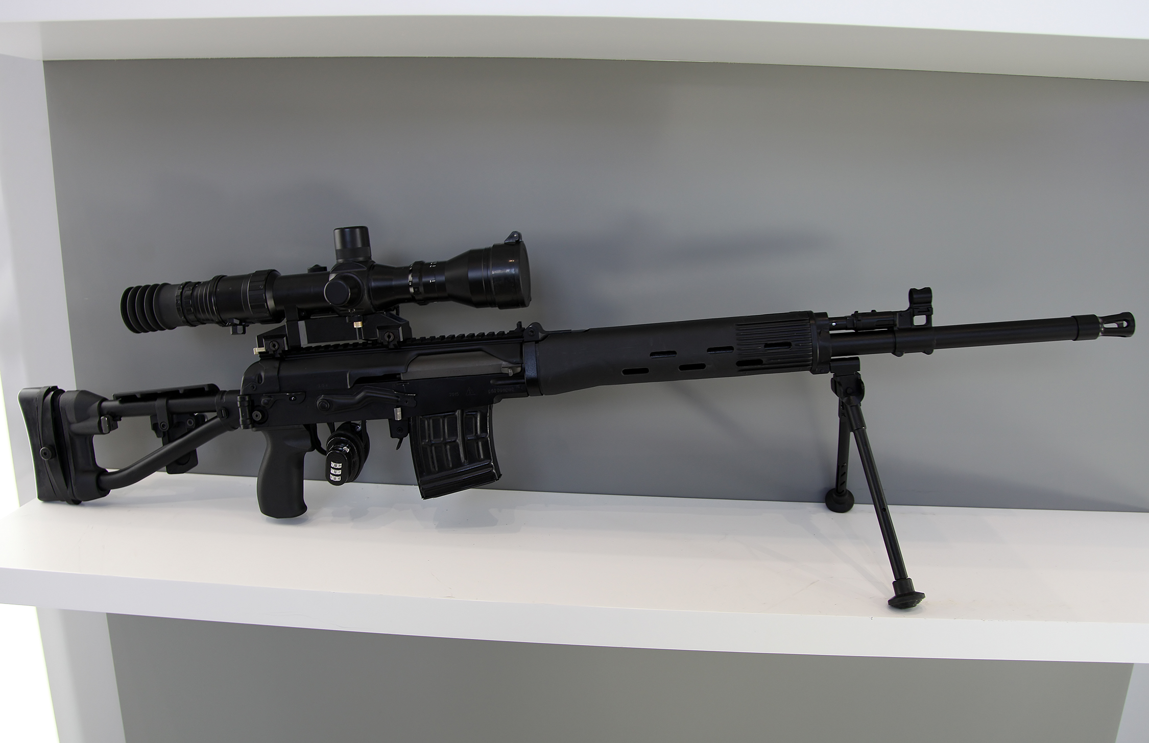 Снайперская винтовка СВДМ